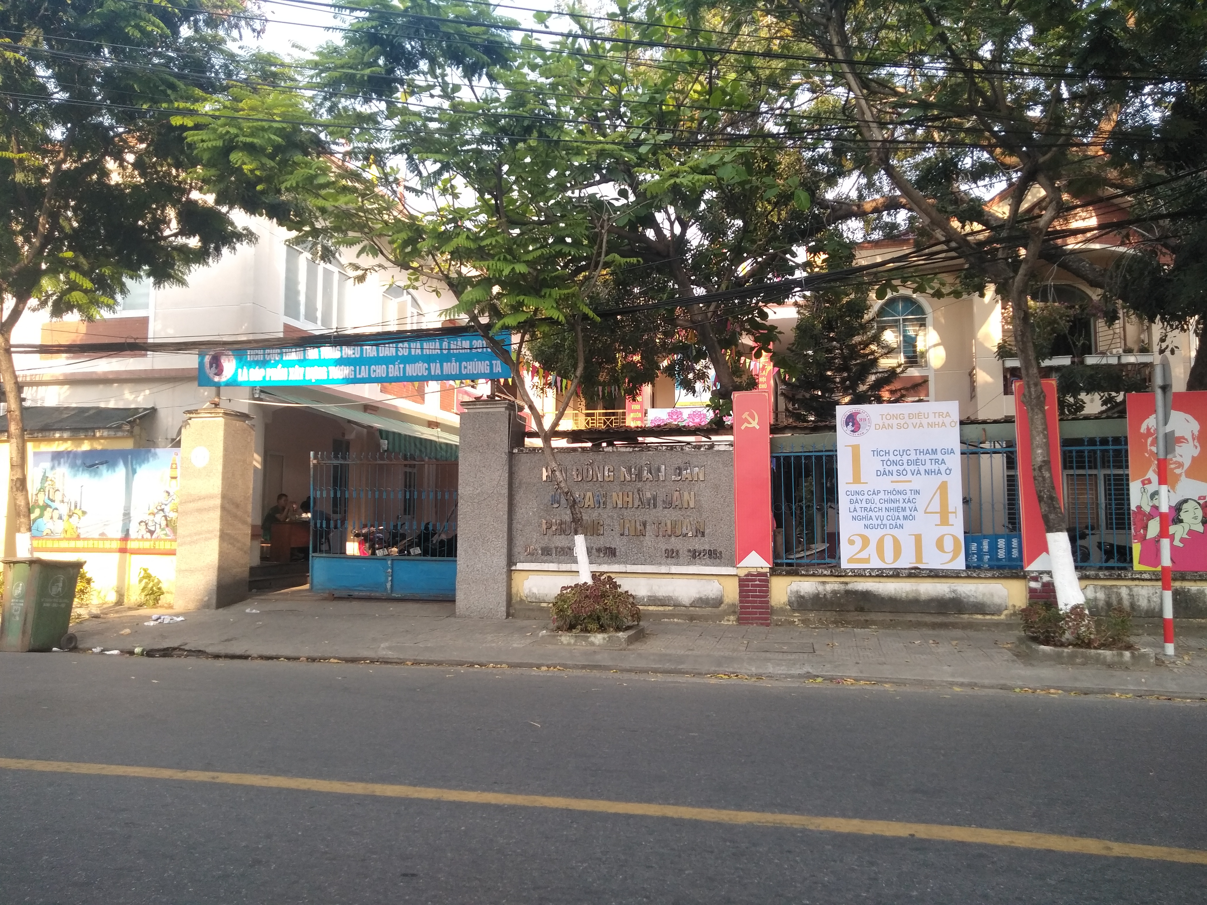 UBND phường Bình Thuận, Hải Châu, Đà Nẵng